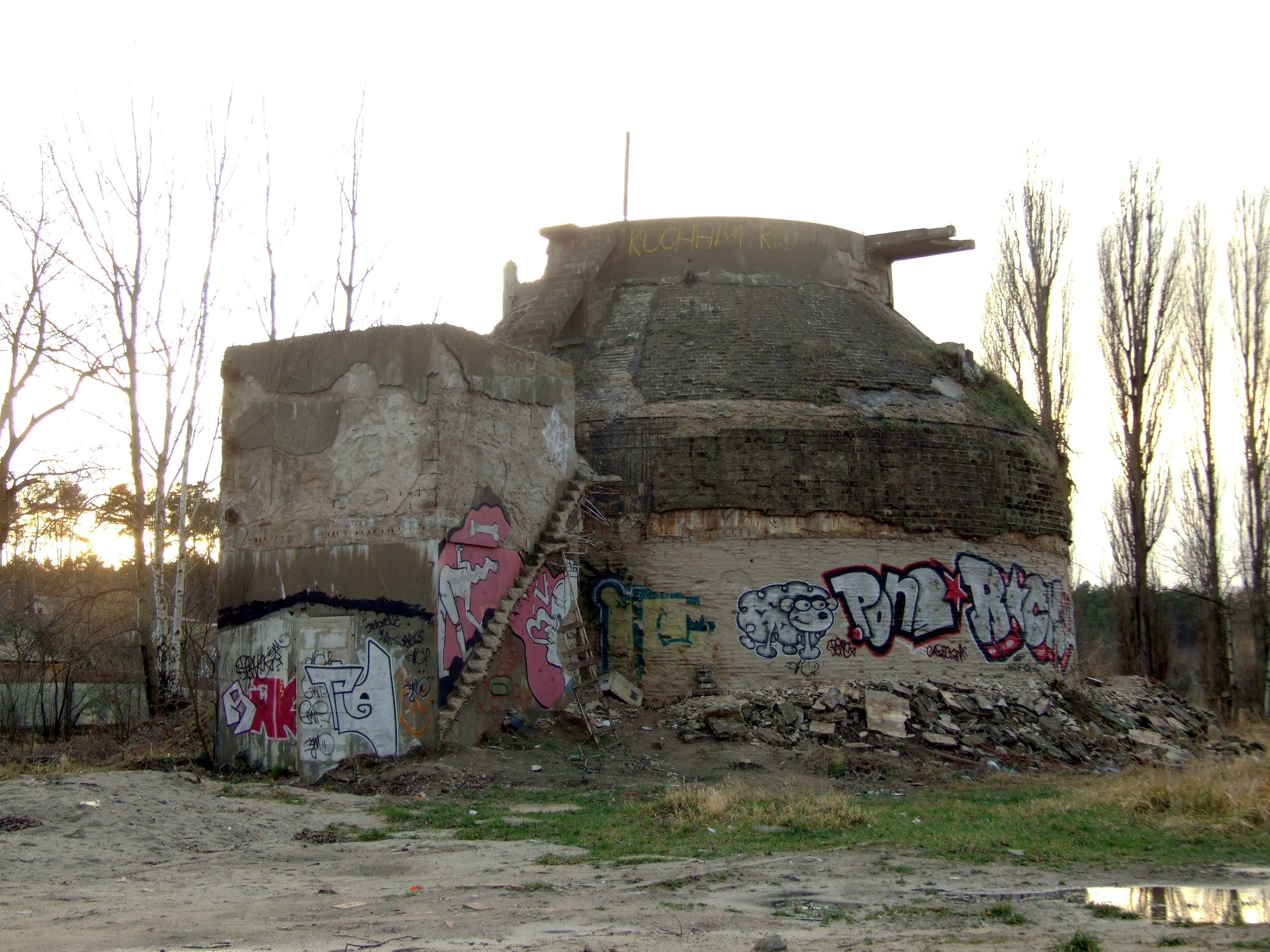 Ruiny przedwojennej oczyszczalni ścieków na Złotej Łączy w Zielonej Górze Author: Mohylek 17:17, 26 January 2007 (UTC)